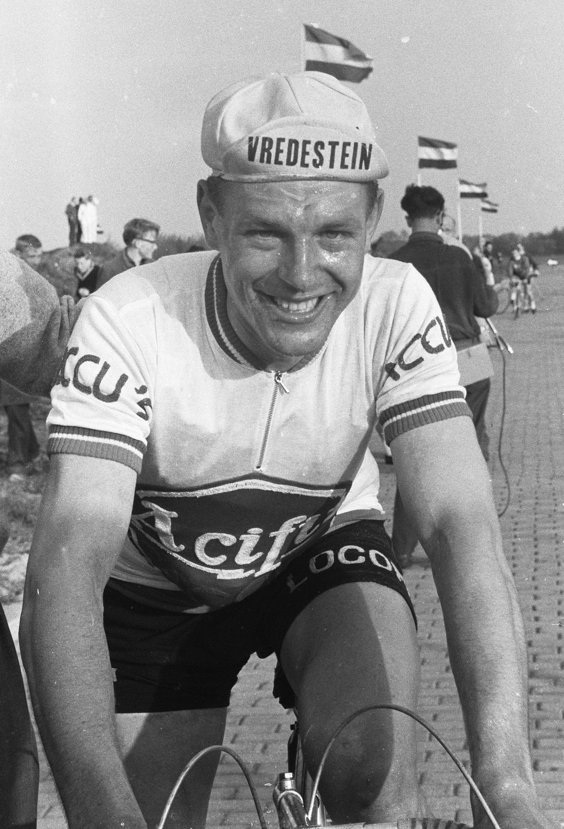 Collectie / Archief : Fotocollectie Anefo Reportage / Serie : [ onbekend ] Beschrijving : Ronde van Nederland. Eerste etappe Amsterdam Heerenveen. Winnaar Roger Baens Datum : 10 mei 1960 Trefwoorden : wielrennen Fotograaf : Pot, Harry / Anefo Auteursrechthebbende : Nationaal Archief Materiaalsoort : Negatief (zwart/wit) Nummer archiefinventaris : bekijk toegang 2.24.01.05 Bestanddeelnummer : 911-2401